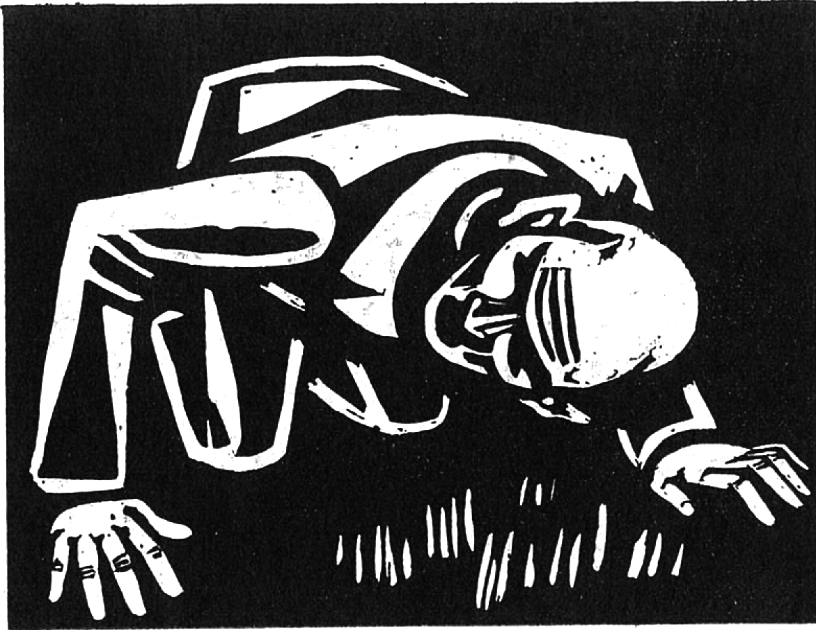 Der Mann, der das Gras wachsen hört, Holzschnitt, Kurt Scheele, 1937, Das Bild ist eines der Bilder, das die Nationalsozialisten 1937 als "entartet" einstuften.